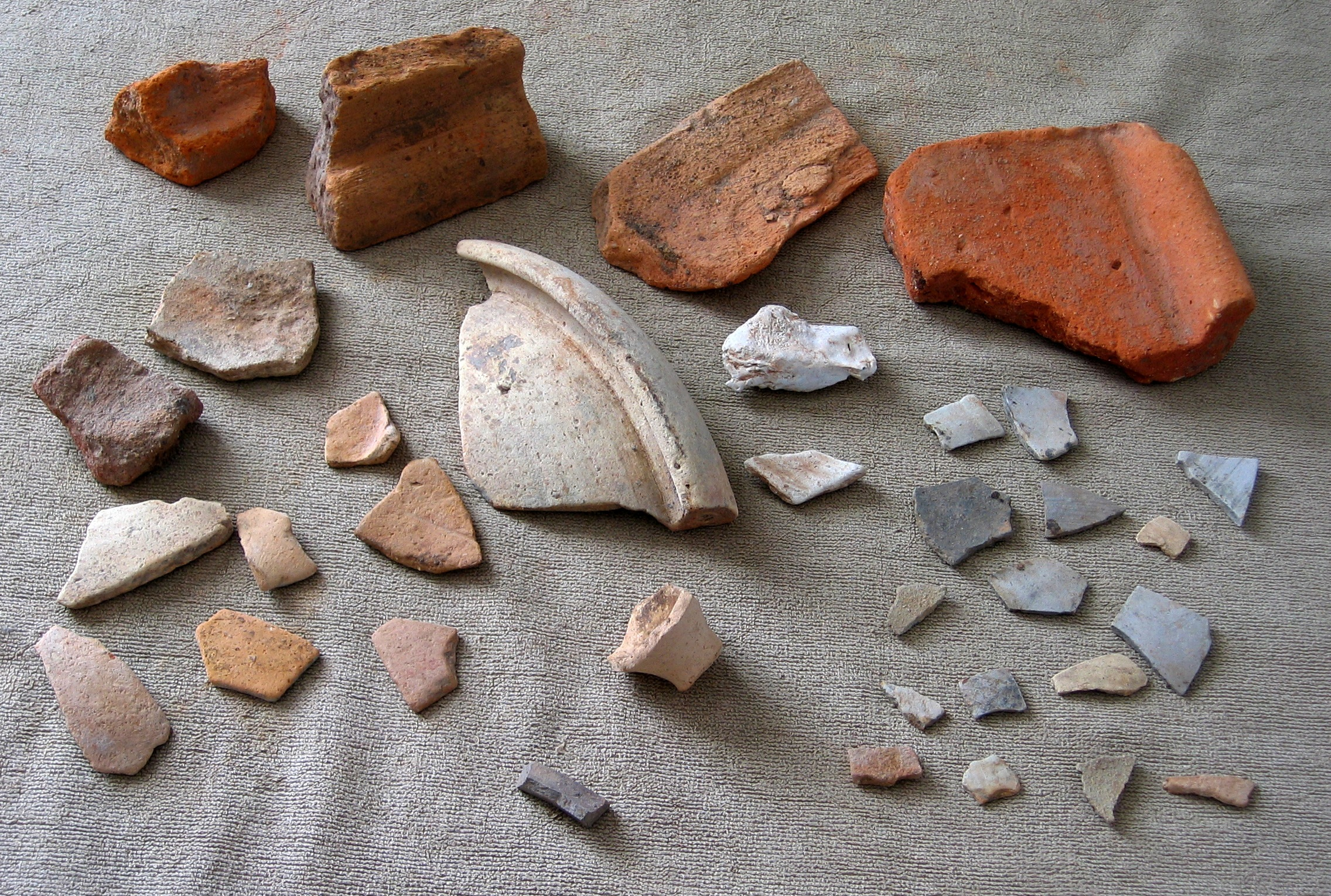 fragments de tuiles et de poteries trouvés en aval de l'église de Braize